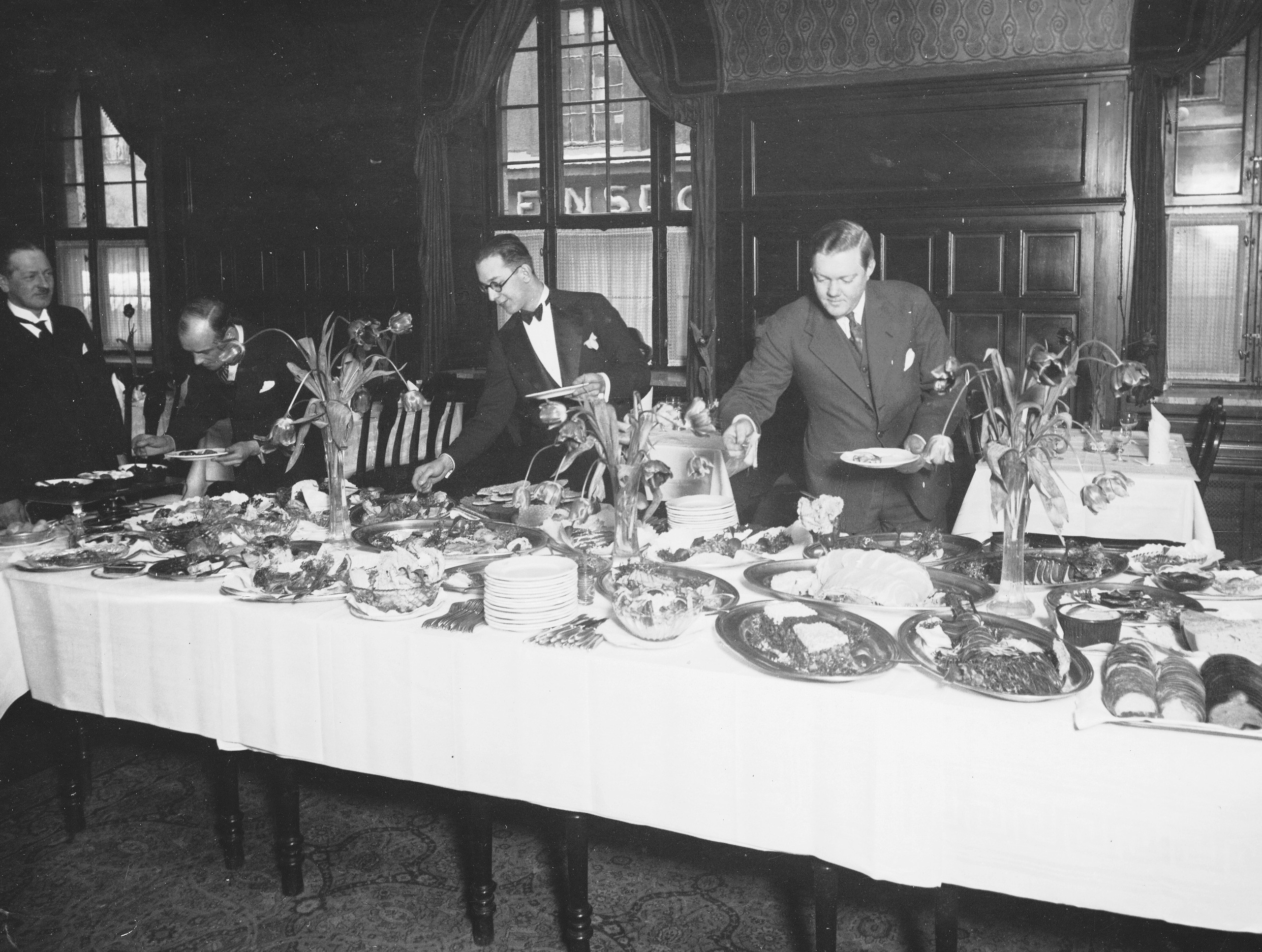 Drottninggatan 29, Hotel Kronprinsen, matsal, smörgåsbord